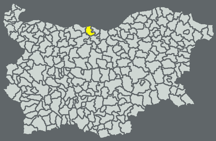 Община Никопол на картата на България